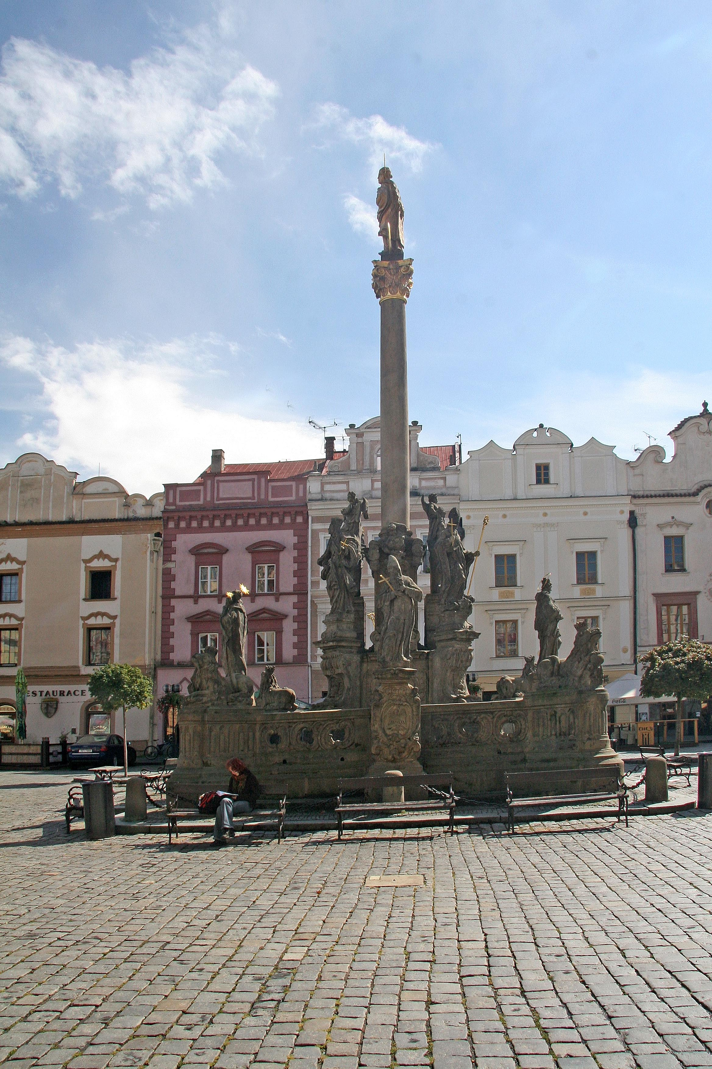 Pardubice - sochařská výzdoba morového sloupu na Pernštýnském náměstí